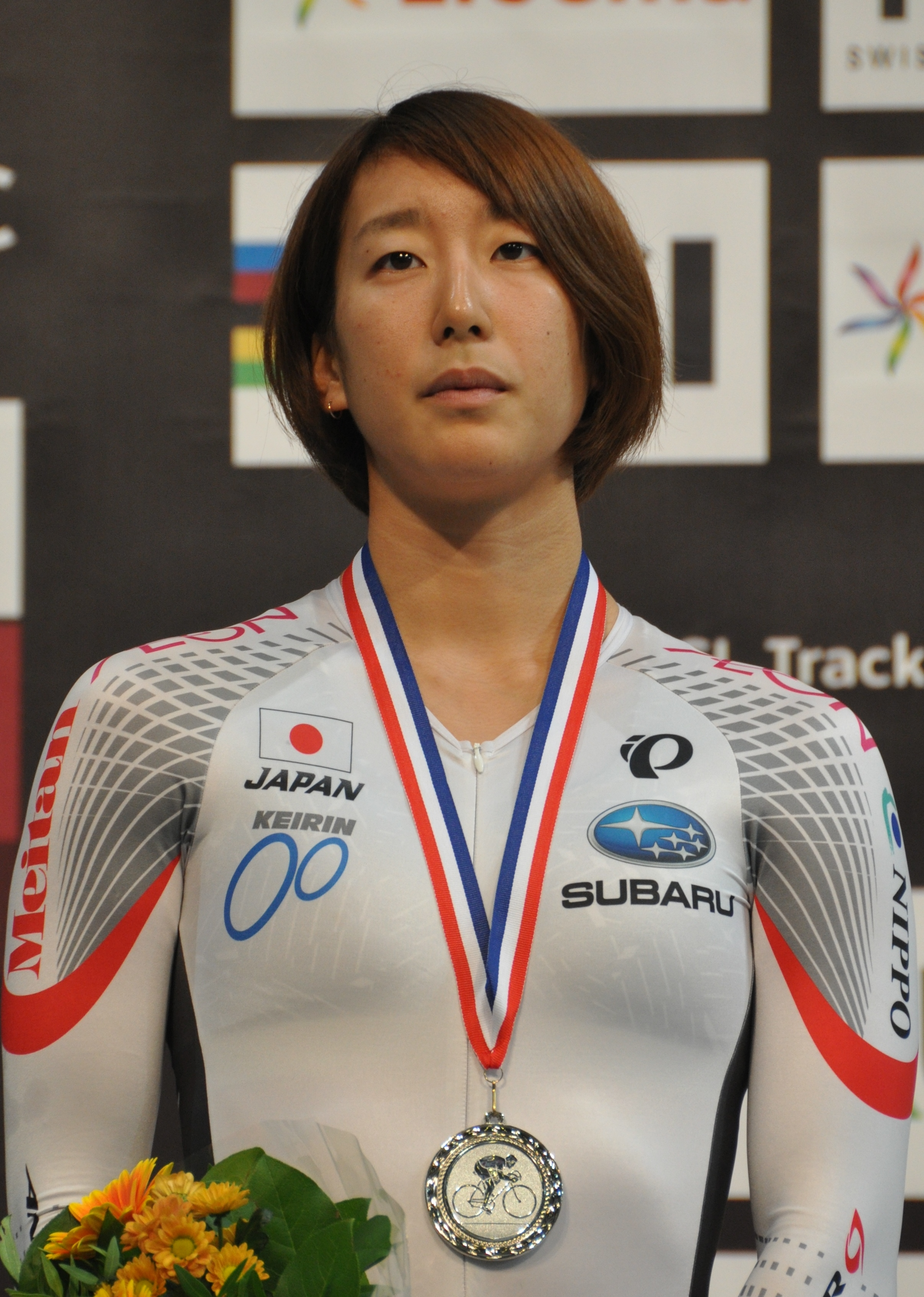 Minami Uwano, japanische Radsportlerin, Silber im Punktefahren